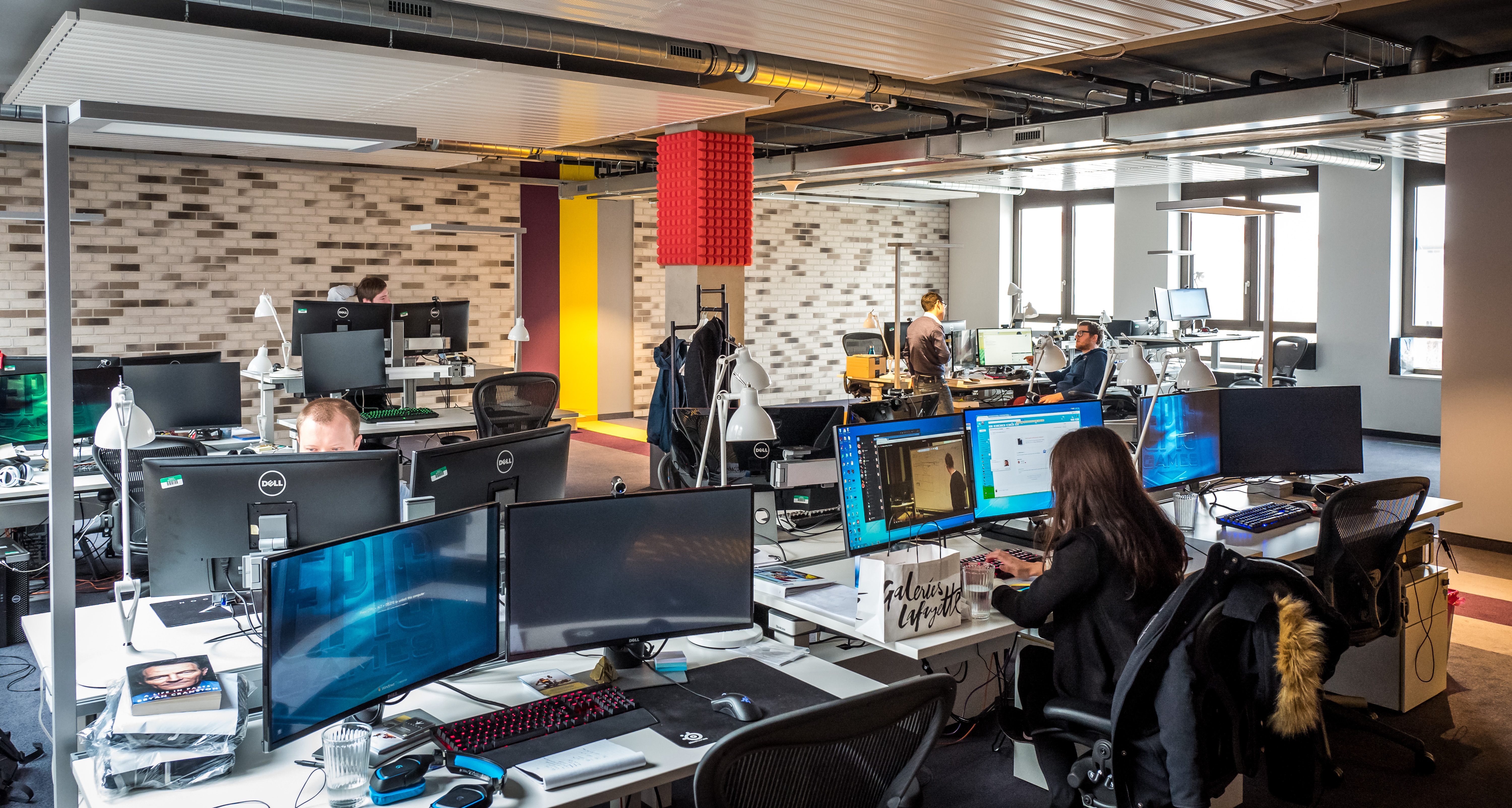 Epic Games Berlin